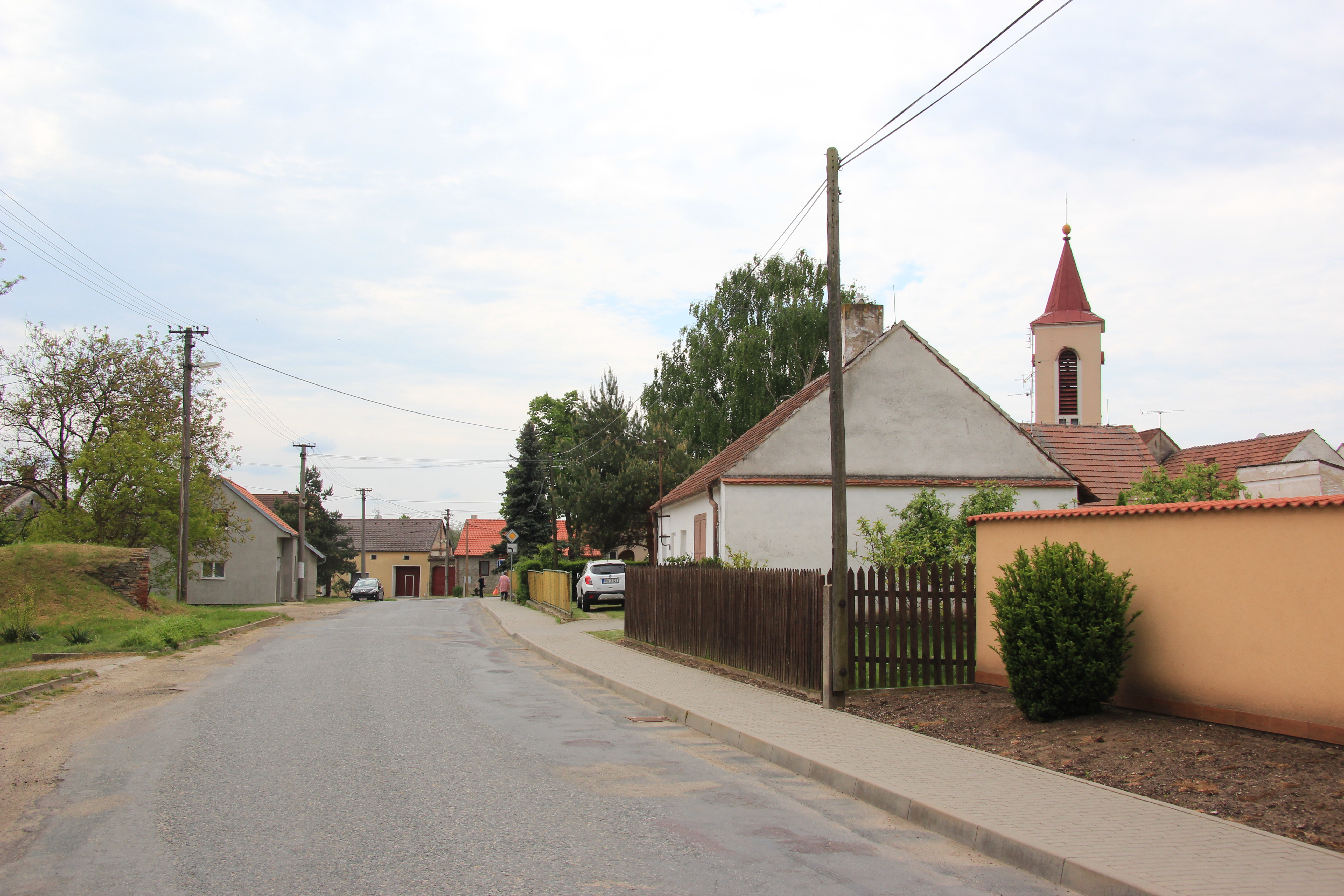 Mackovice